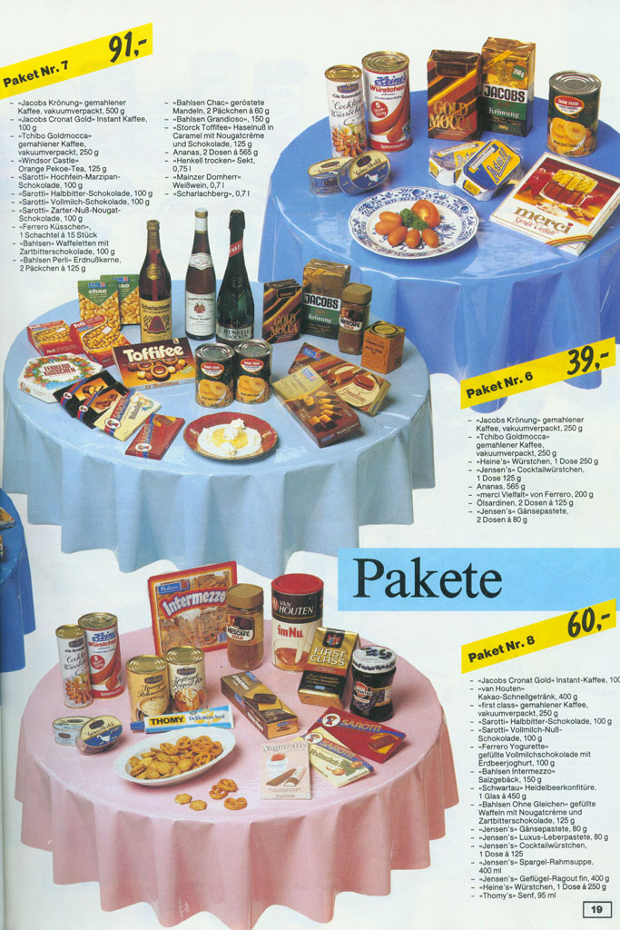 Foto aus dem Katalog der Genex.